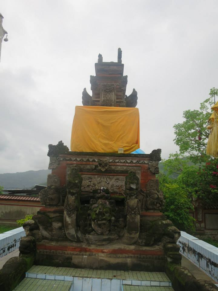 Hindutempel in Dili